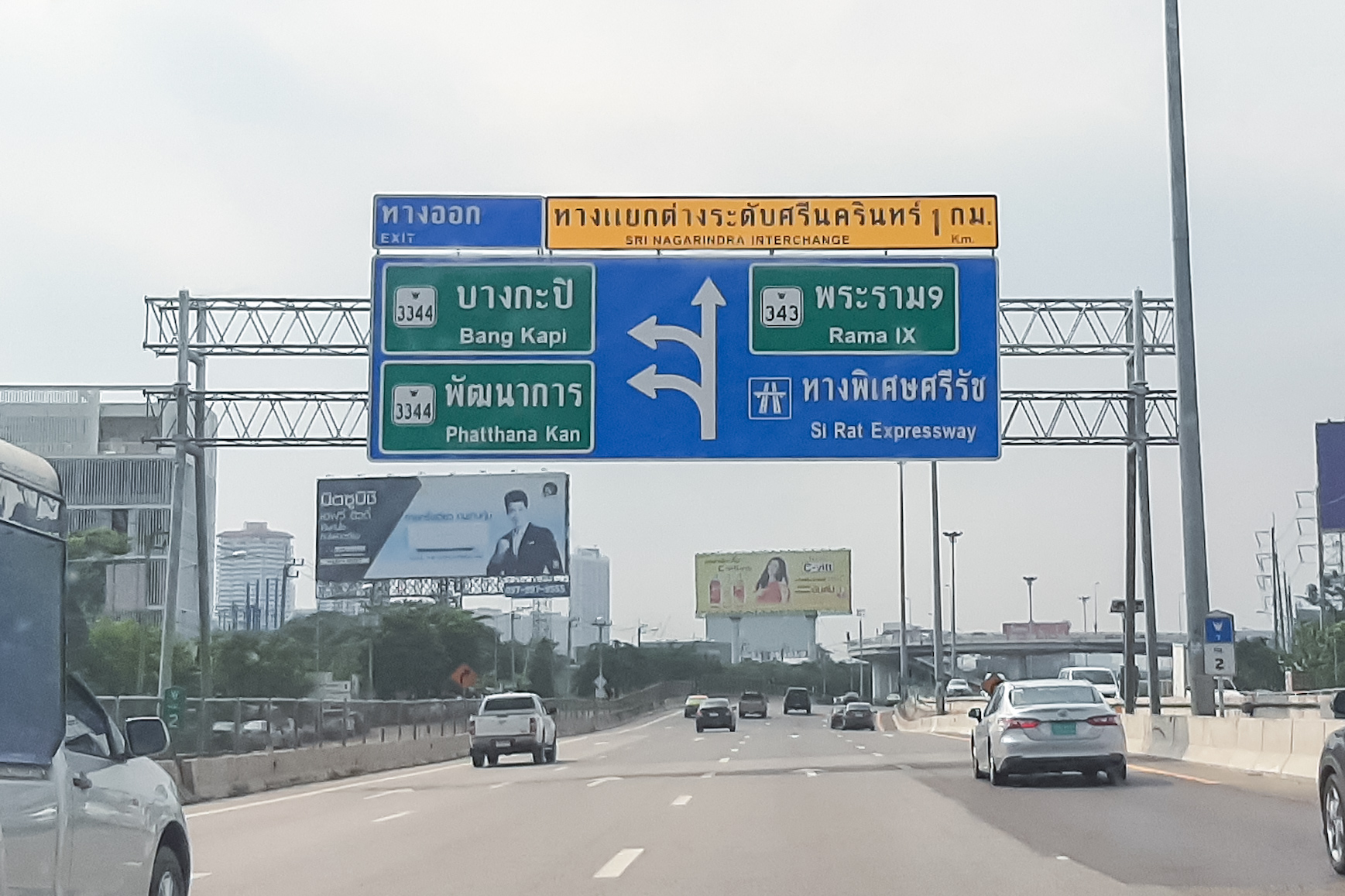 Head to rama ix new sign